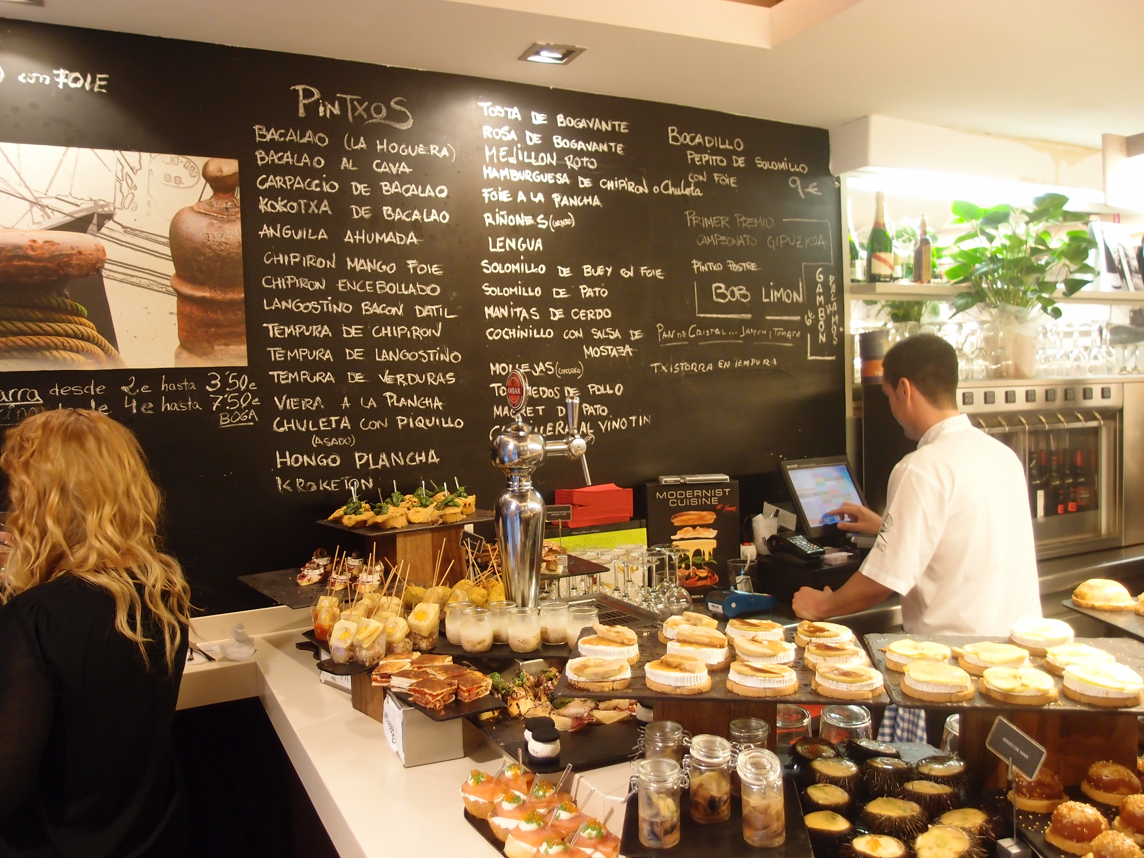 Pintxos in einer Altstadtbar (Bar Zeruko) von Donostia San Sebastian (span. Baskenland) Datum: 09.05.2014 Urheber: M. Pfeiffer alias Gordito1869 Quelle: Privates Fotoarchiv des Urhebers